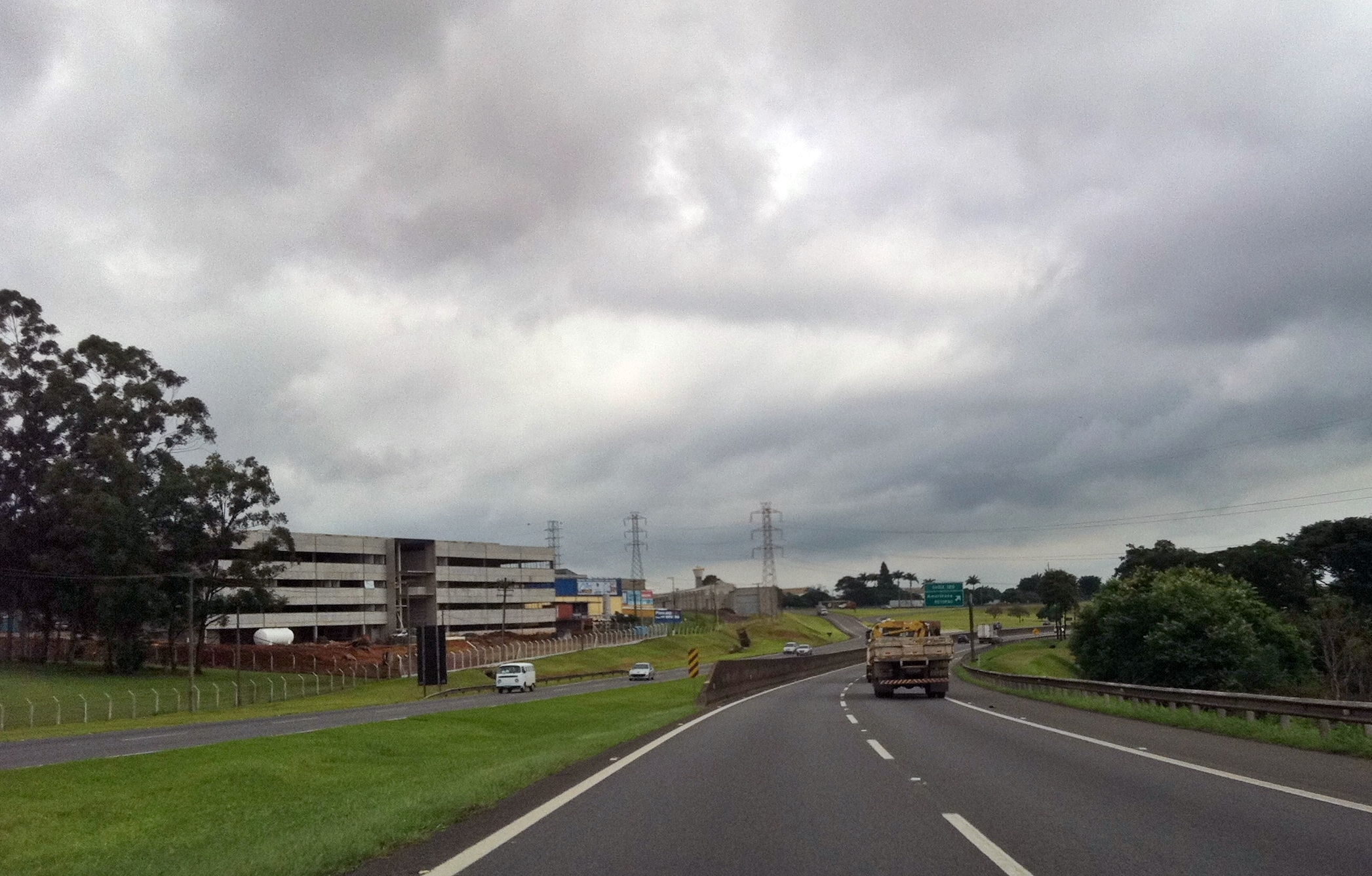 Americana - São Paulo, Brasil